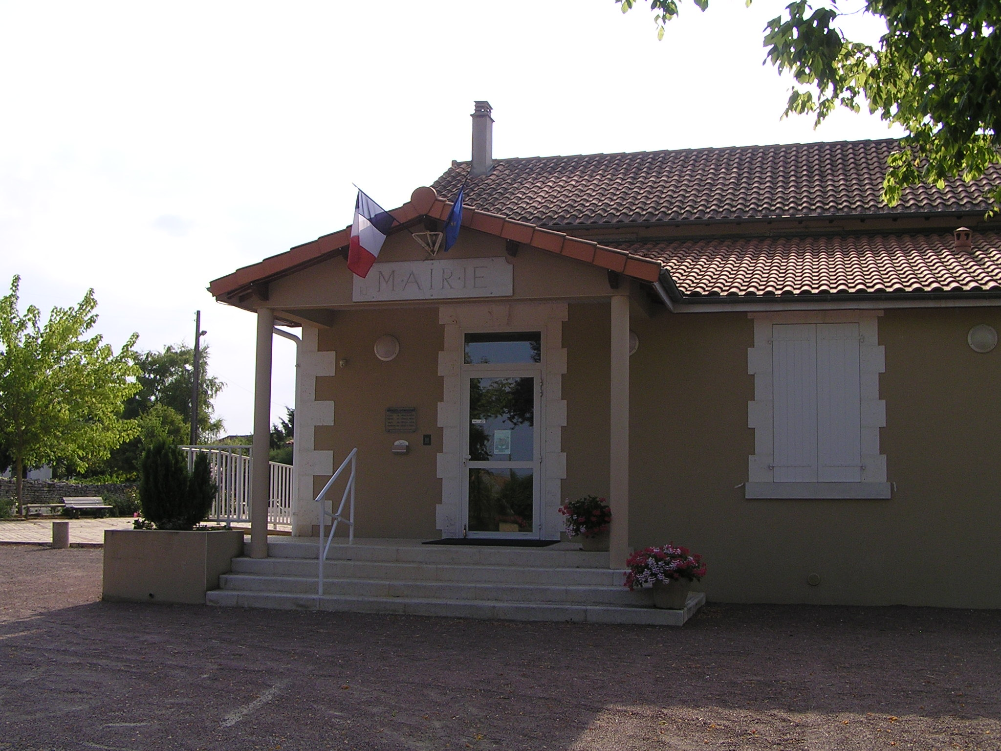 mairie de La faye